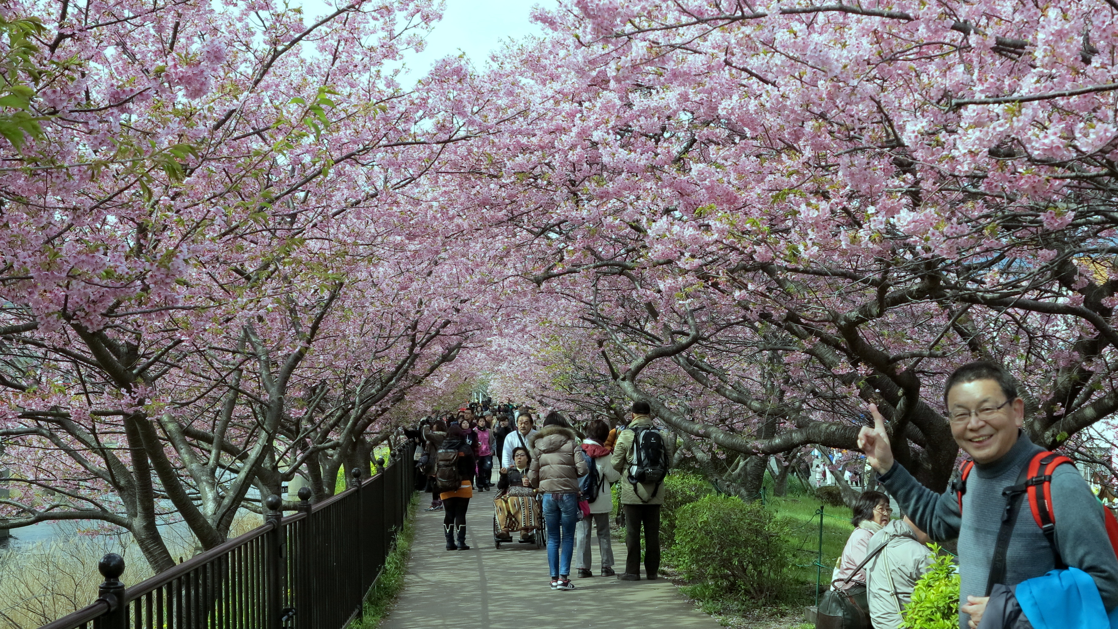 日本 伊豆 河津町樱花盛开